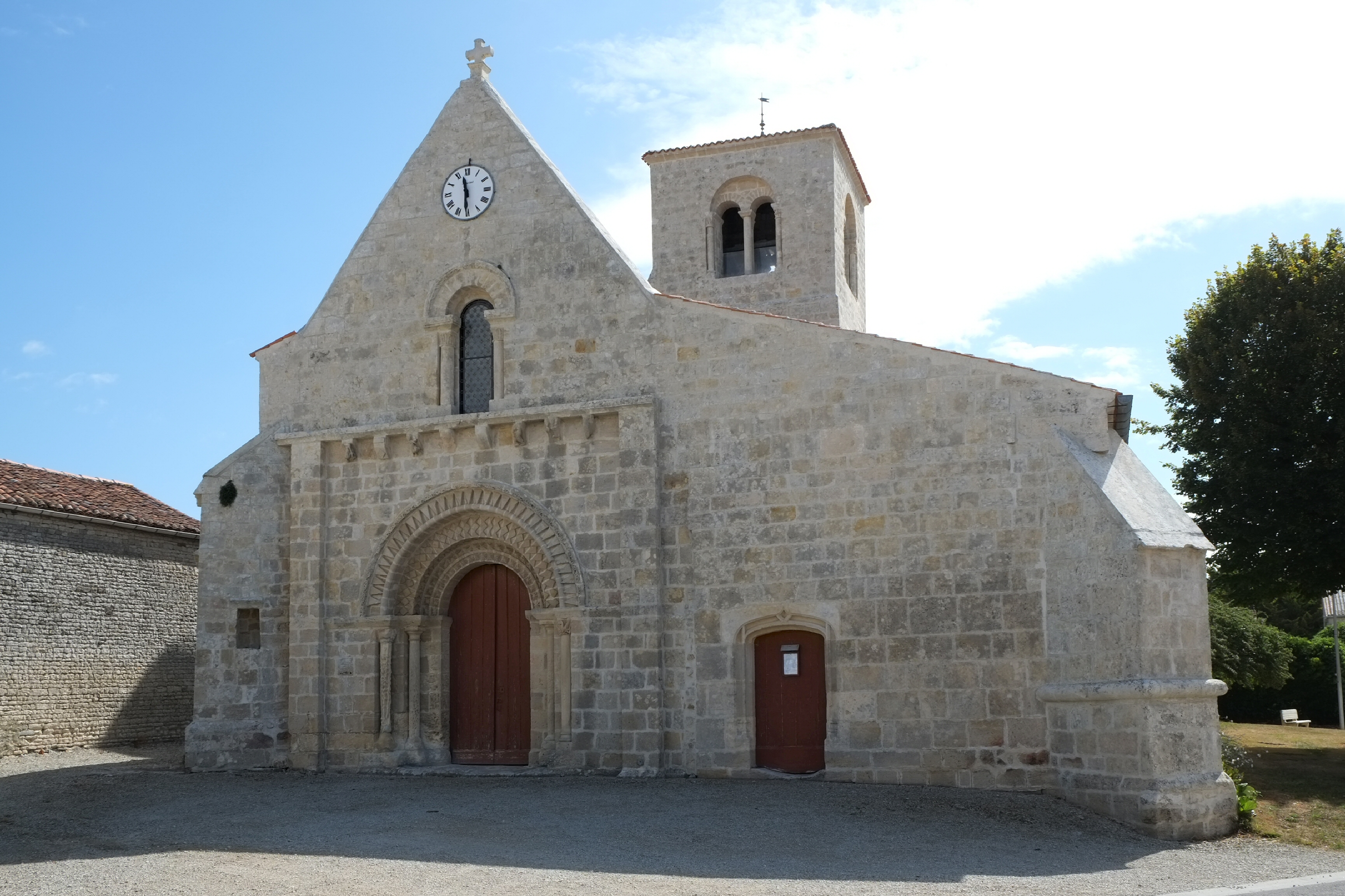 Église Saint-Pierre et Saint-Paul Blanzac-lès-Matha Charente-Maritime france